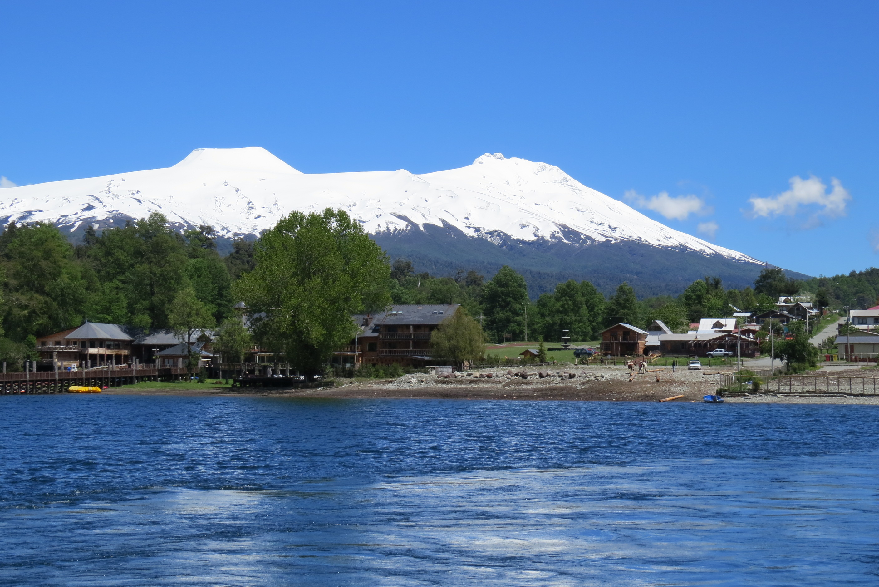 Puerto Fuy, Region de los Rios, Chile Pablo Flores